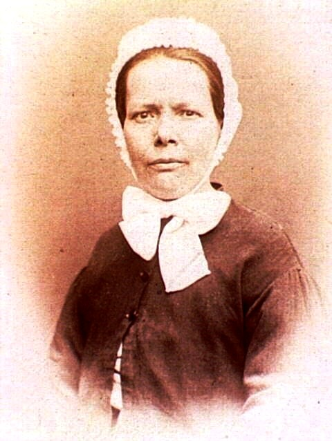 Nathalie Lemel: El 8 de maig de 1921 mor cega i en la misèria a l'hospici d'Ivry-sur-Seine (França) la communard, militant anarquista i feminista Nathalie Duval, més coneguda com Nathalie Lemel. Havia nascut el 24 d'agost de 1826 a Brest (Bretanya) on els seus pares tenien un cafè.